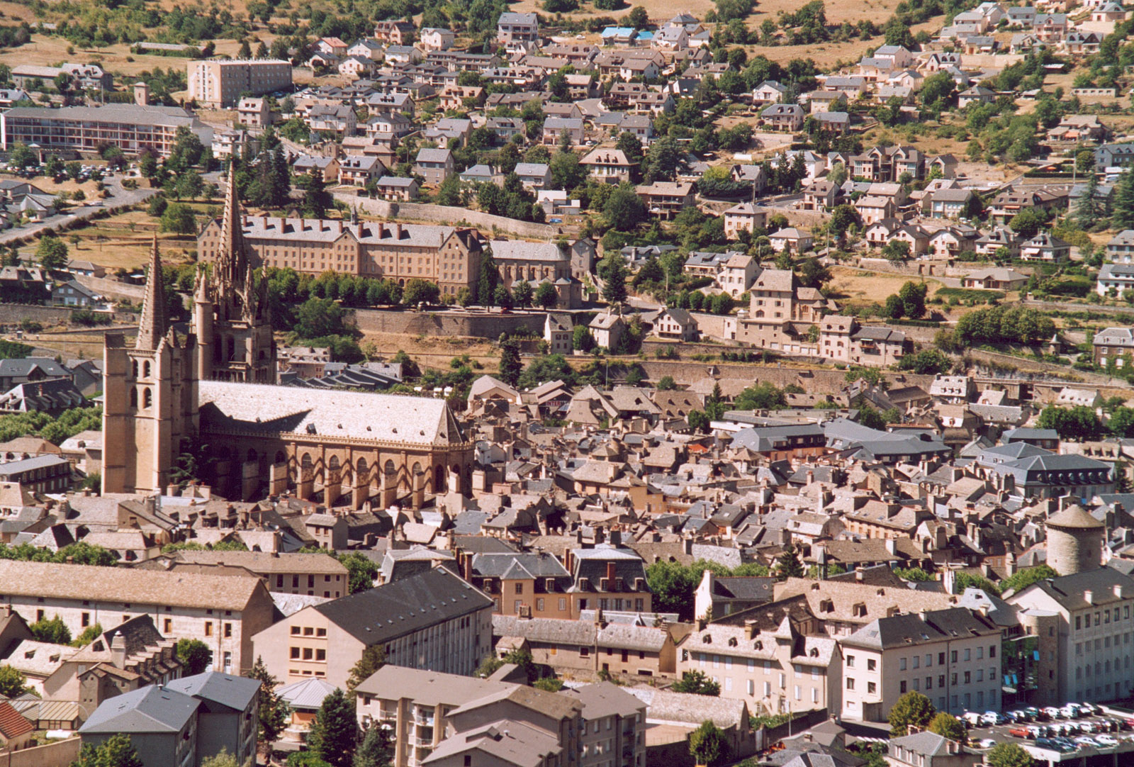 Mende Lozère Auteur GIRAUD Patrick